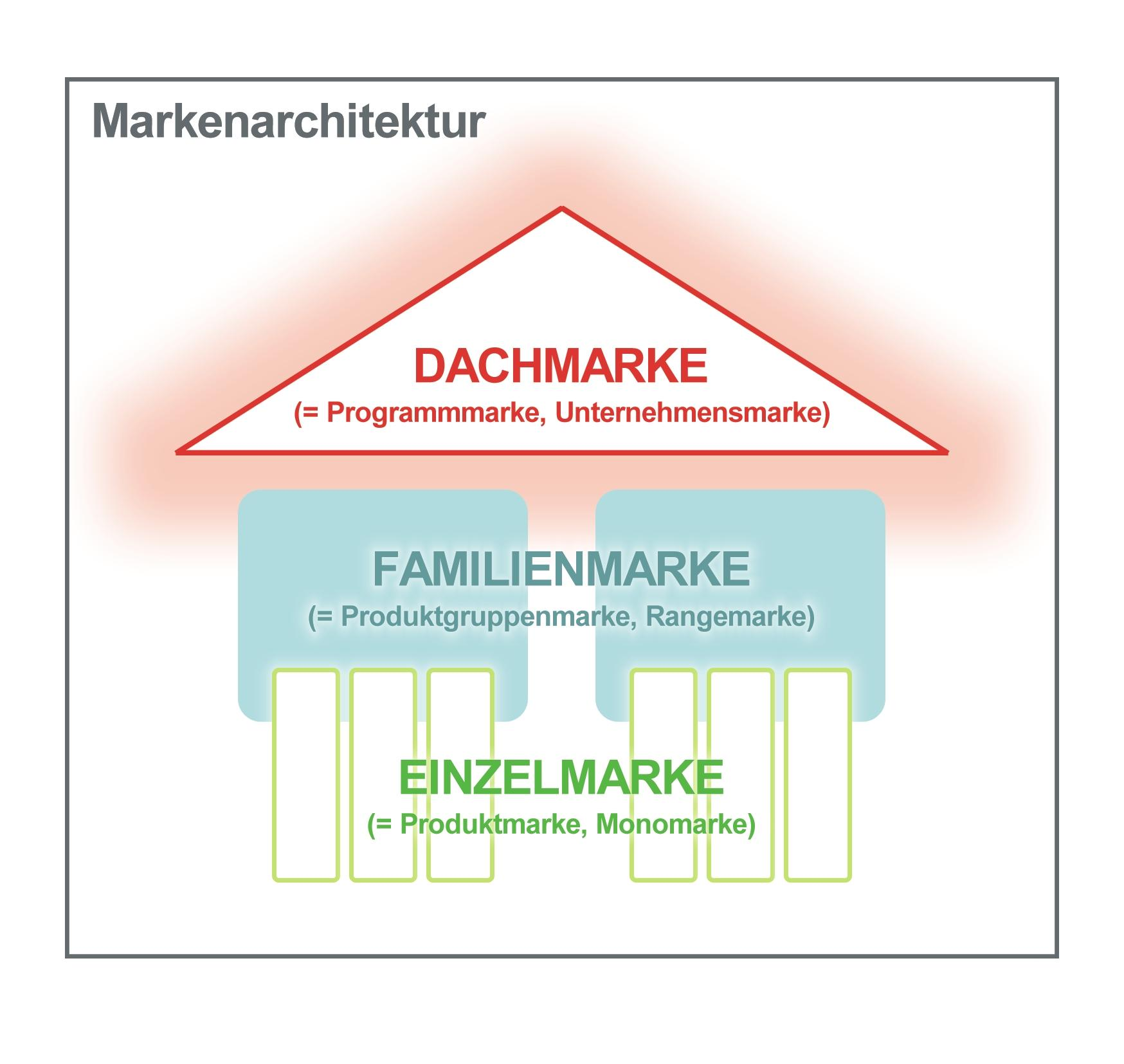 Aufbau der Markenarchitektur